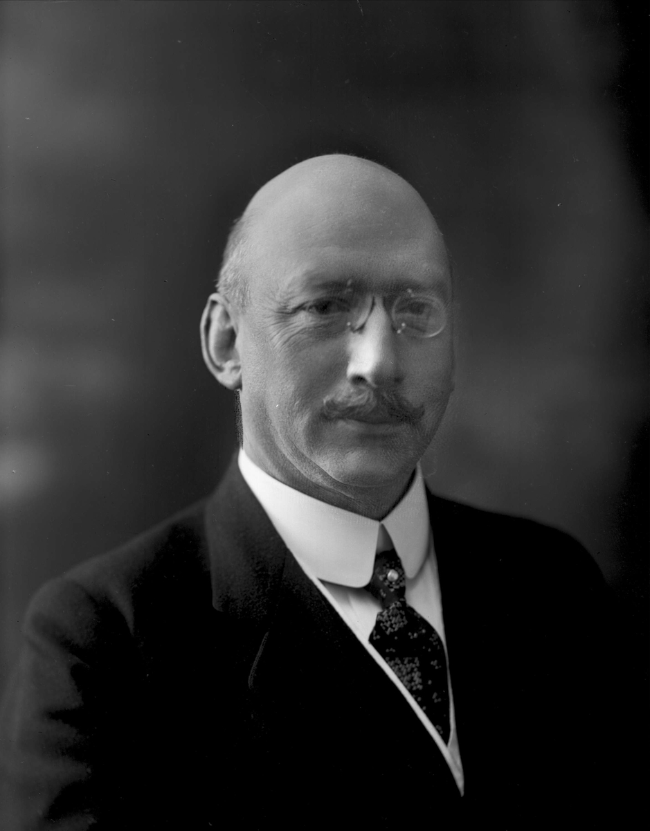 Victor Nordan fotografert av Gustav Borgen, fra Norsk Folkemuseums samling. Dato: 26. mars 1915 (iflg. NFM, som daterer andre lignende bilder 18. mars). Fra Norsk Folkemuseums samling. Inventarnummer: NFB.25296.